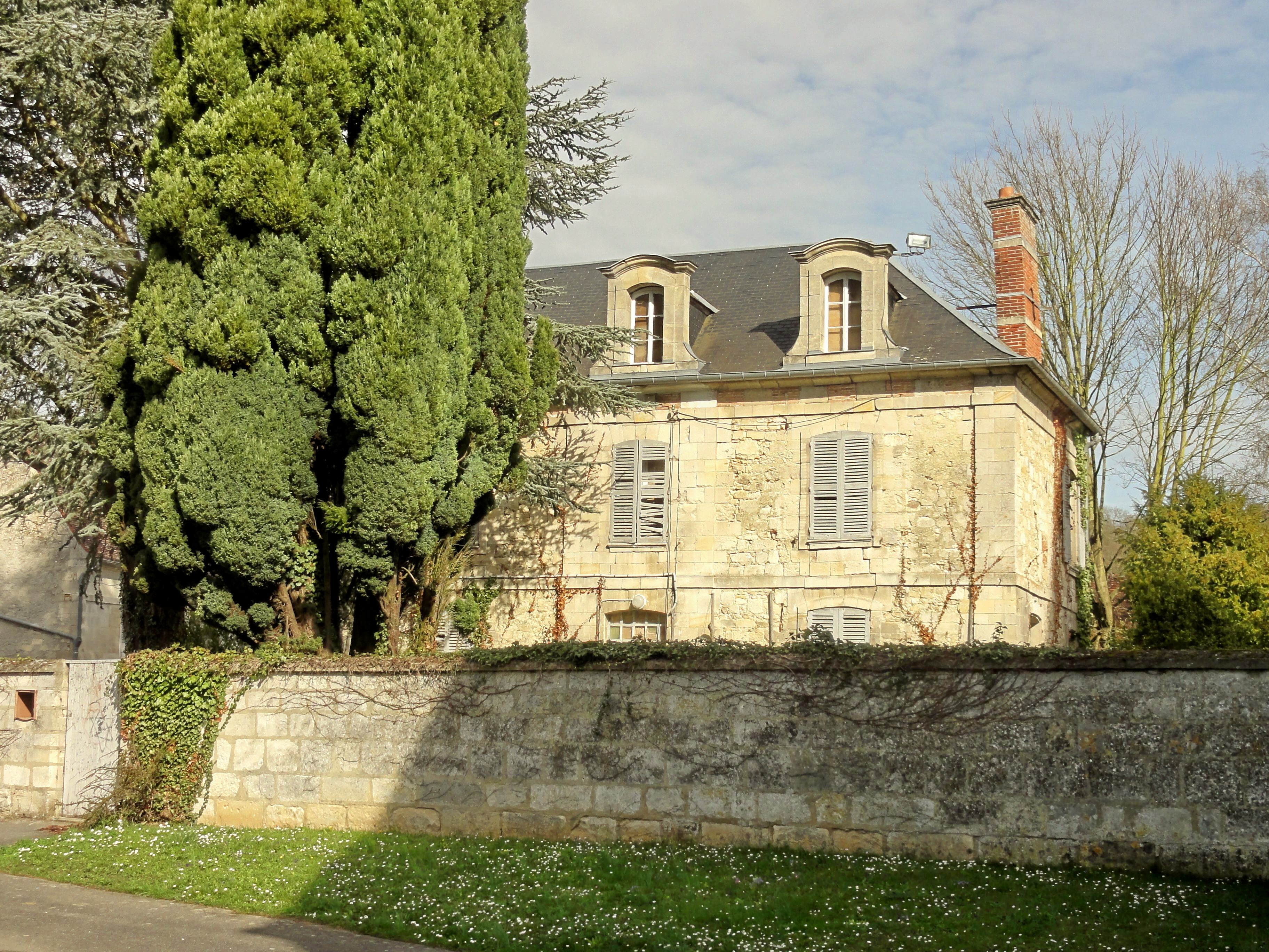 Rue de l'Église.